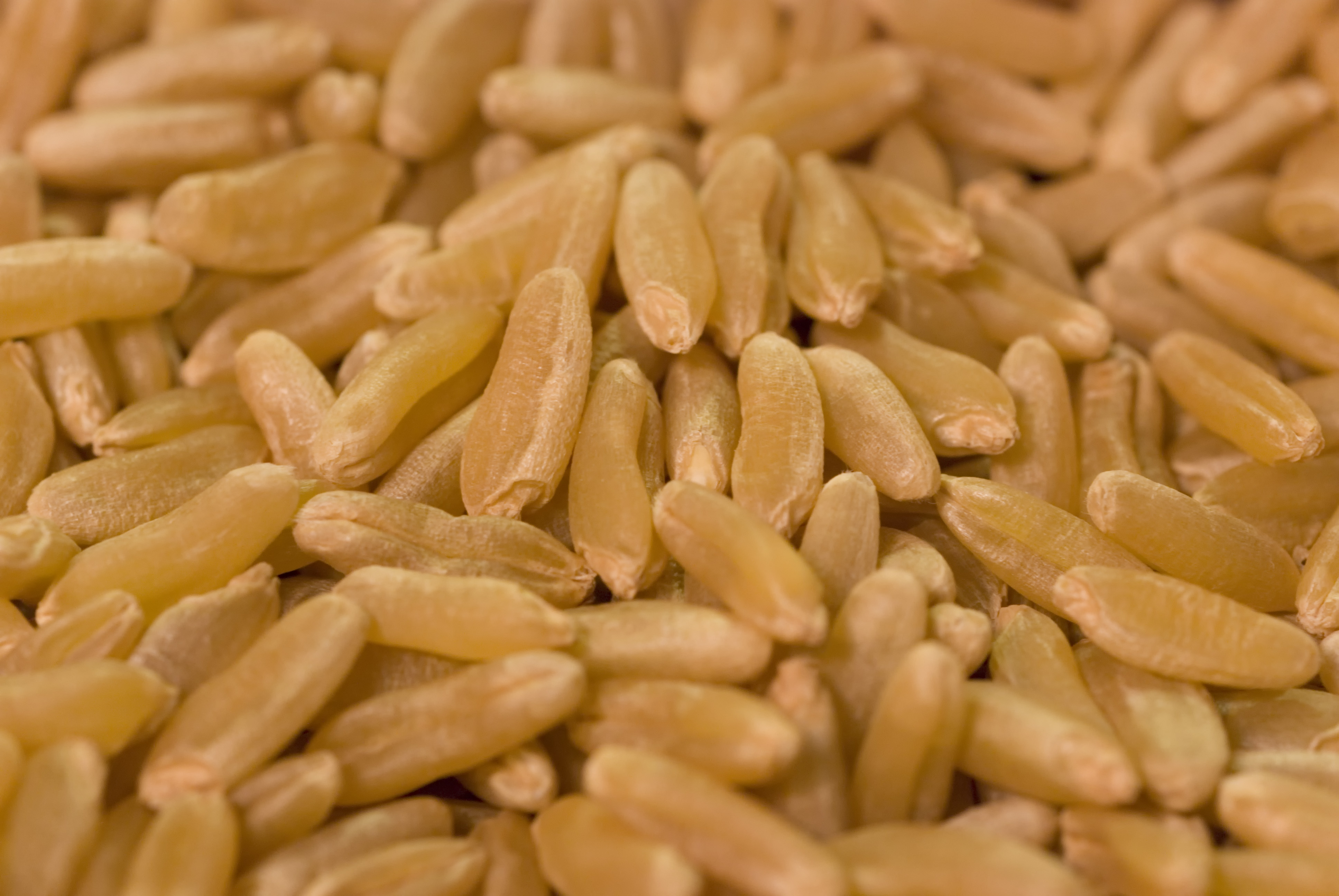 Kamut